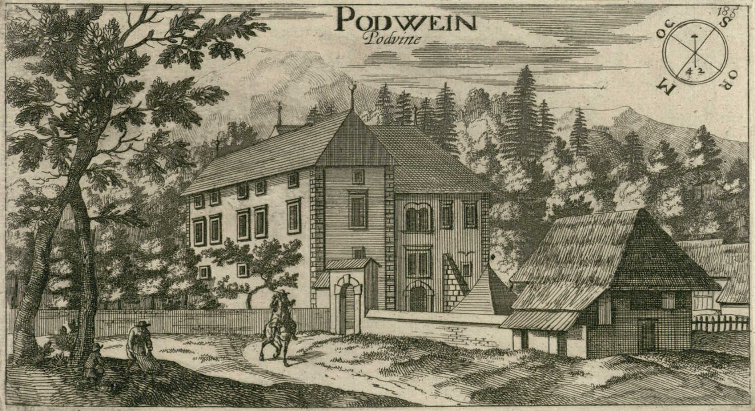 Dvorec Podvin